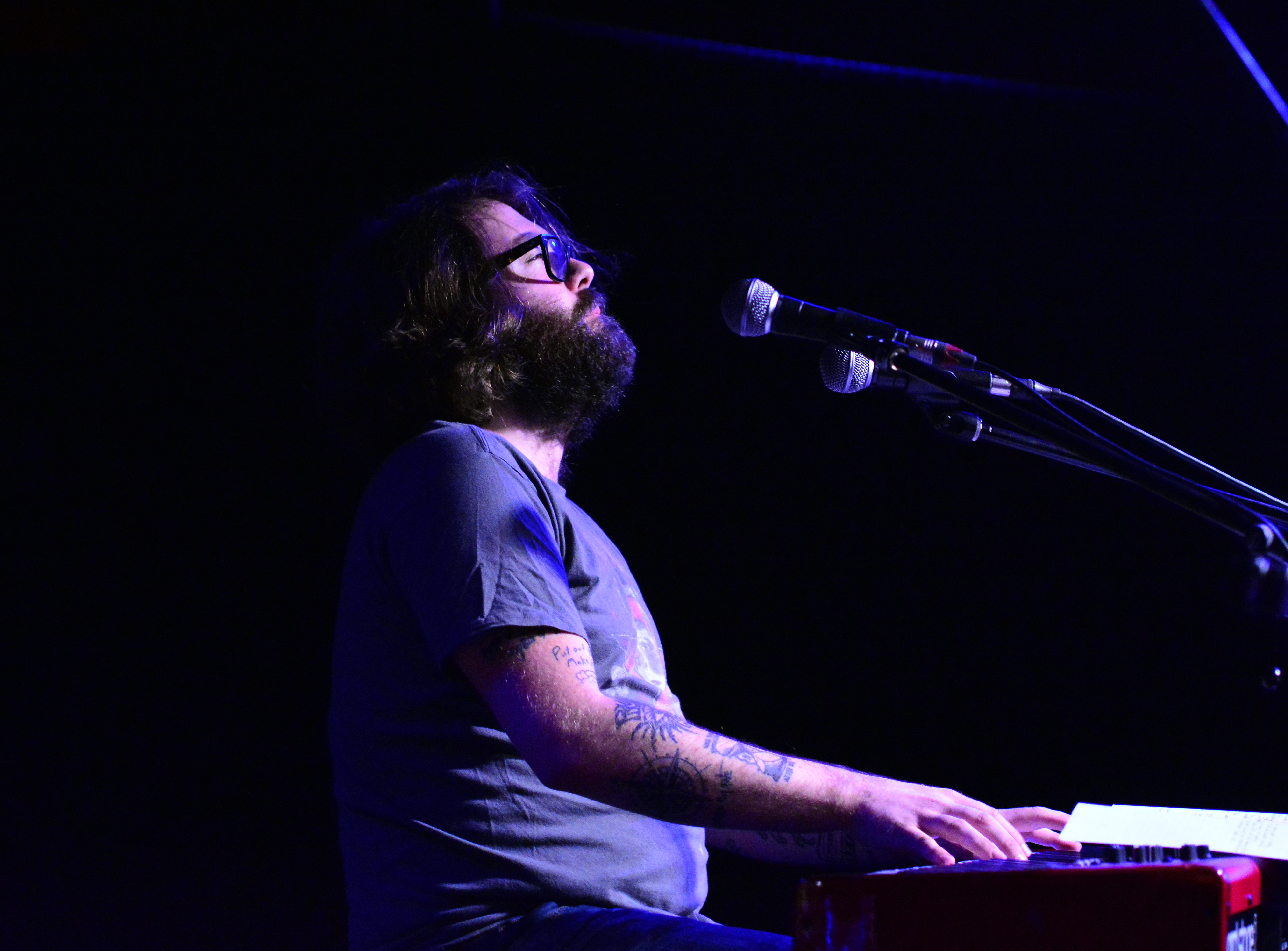 John Allen im Nochtspeicher Hamburg